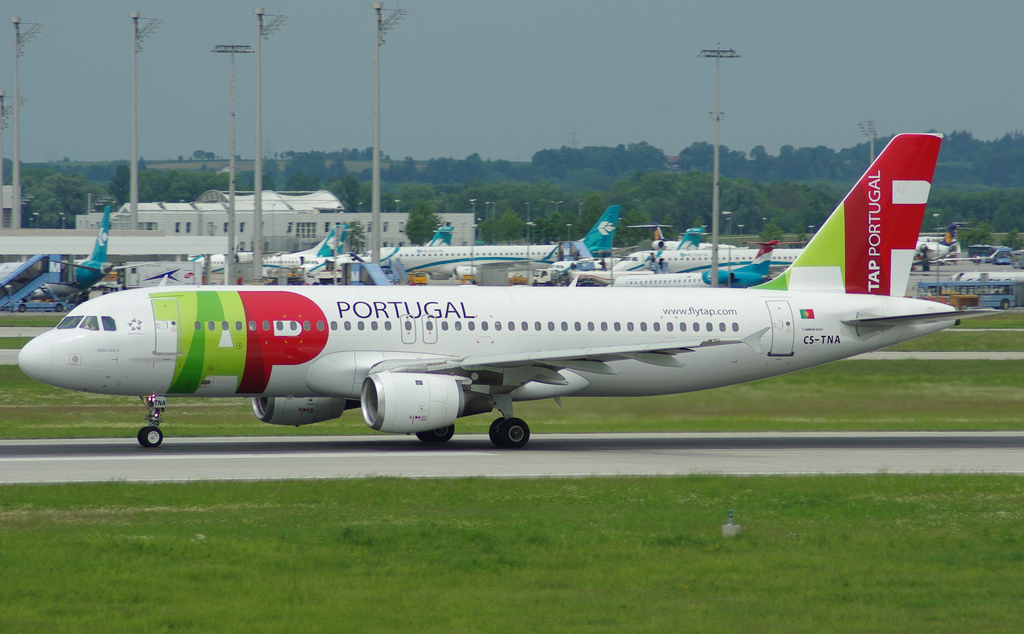 TAP Portugal A320-200 CS-TNA in München-Franz-Josef-Strauß MUC.